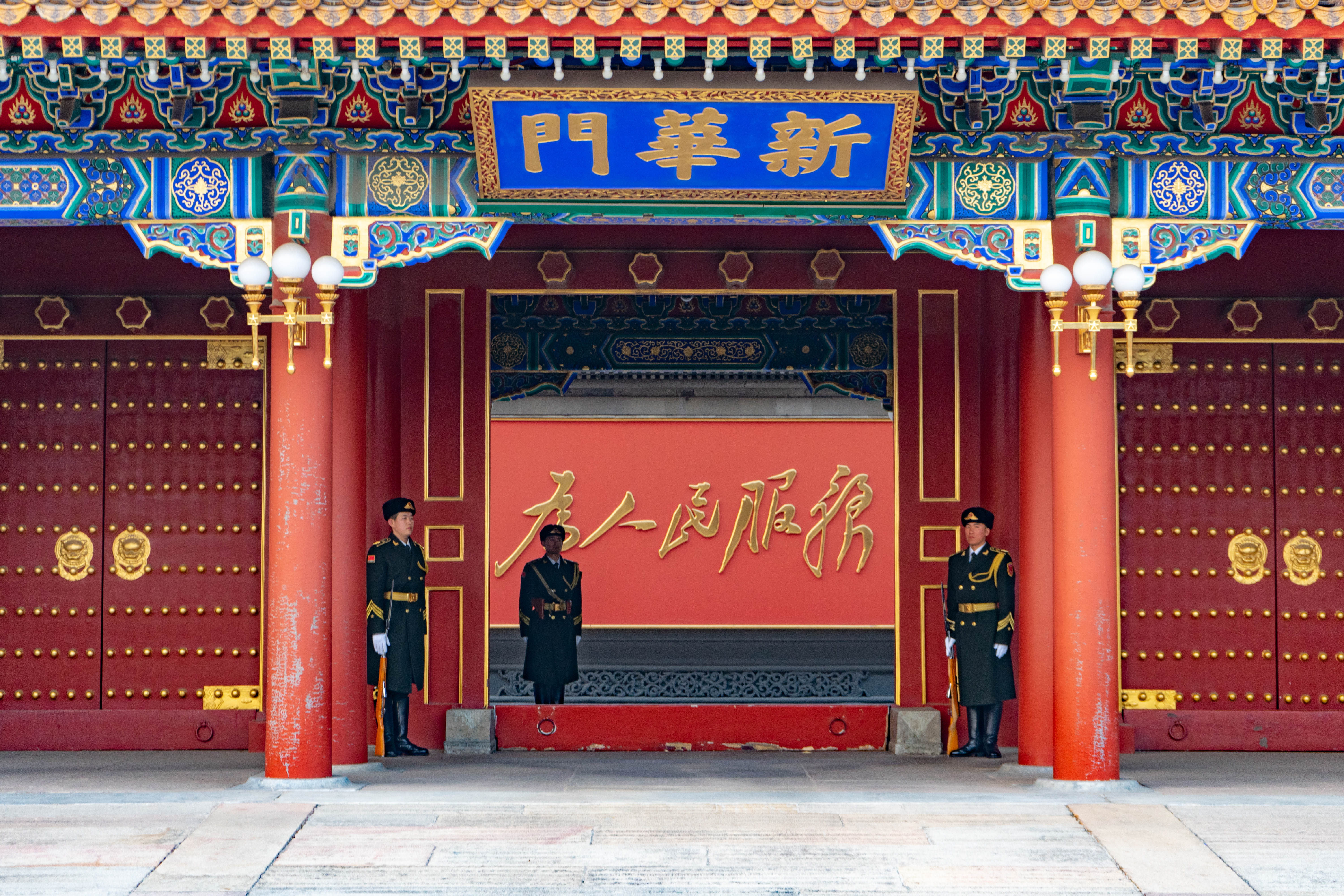 中南海南门-新华门